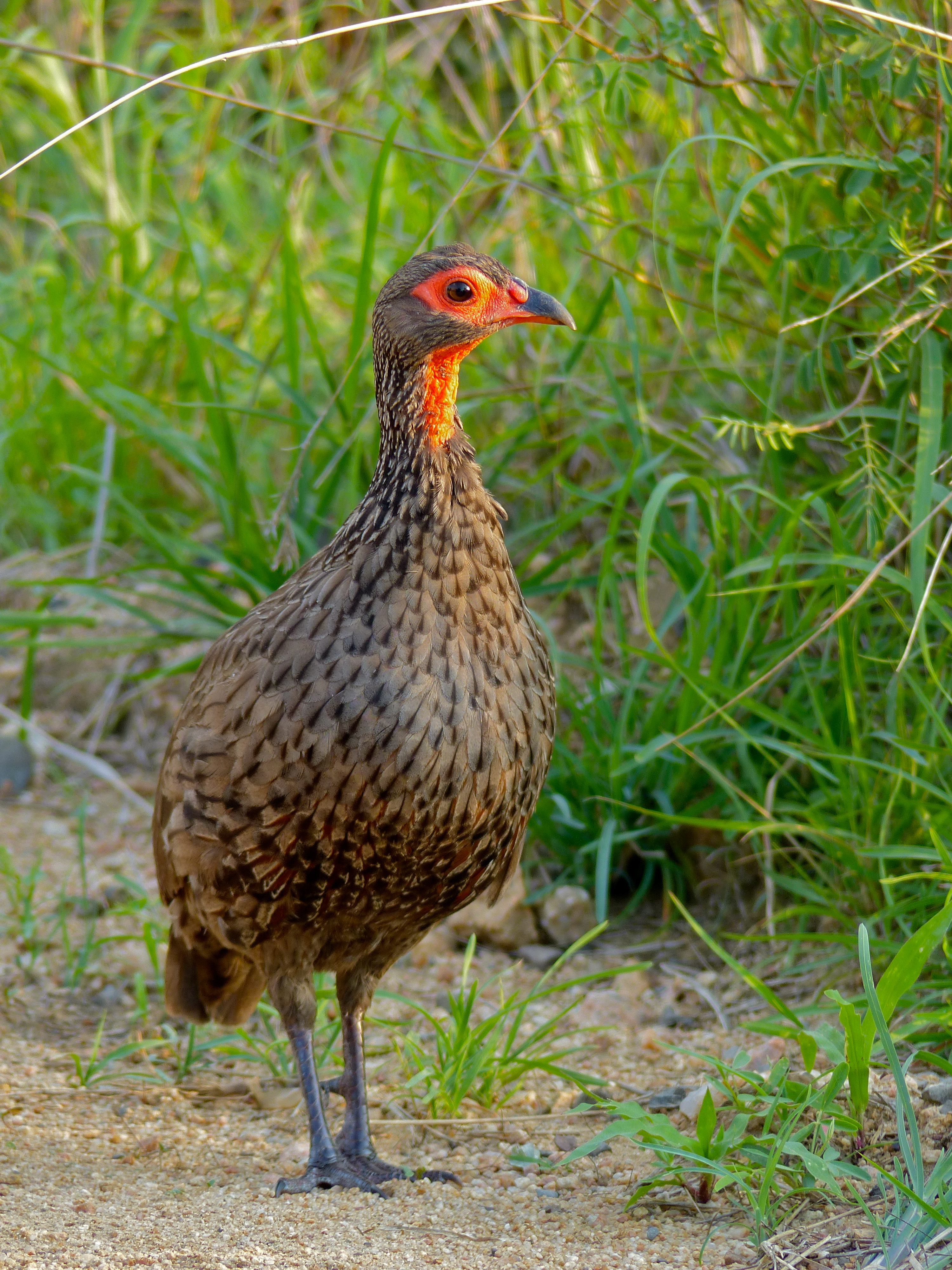 S25 (Crocodile) Road, Kruger NP, SOUTH AFRICA